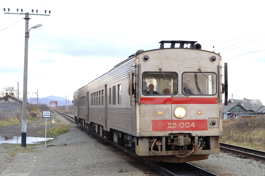 Д2 in Pionery